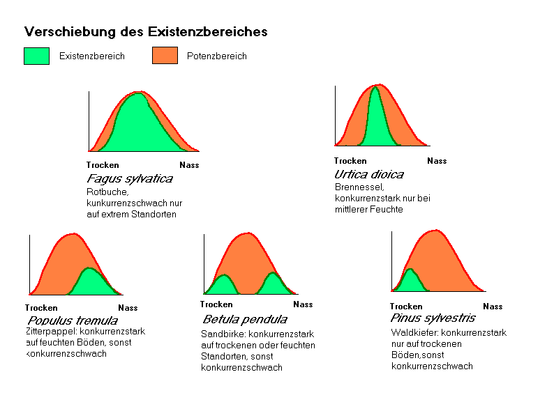 Verschiebung der ökologischen Existenzbereiche. Die Grafik soll ökologische Potenz und Konkurrenz, bzw. tatsächliche Präsenz an Hand von Pflanzen verdeutlichen. Nach Ellenberg (Vegetation Mitteleuropas ...) kommt die Waldkiefer auch auf feuchten sauren Standorten vor.